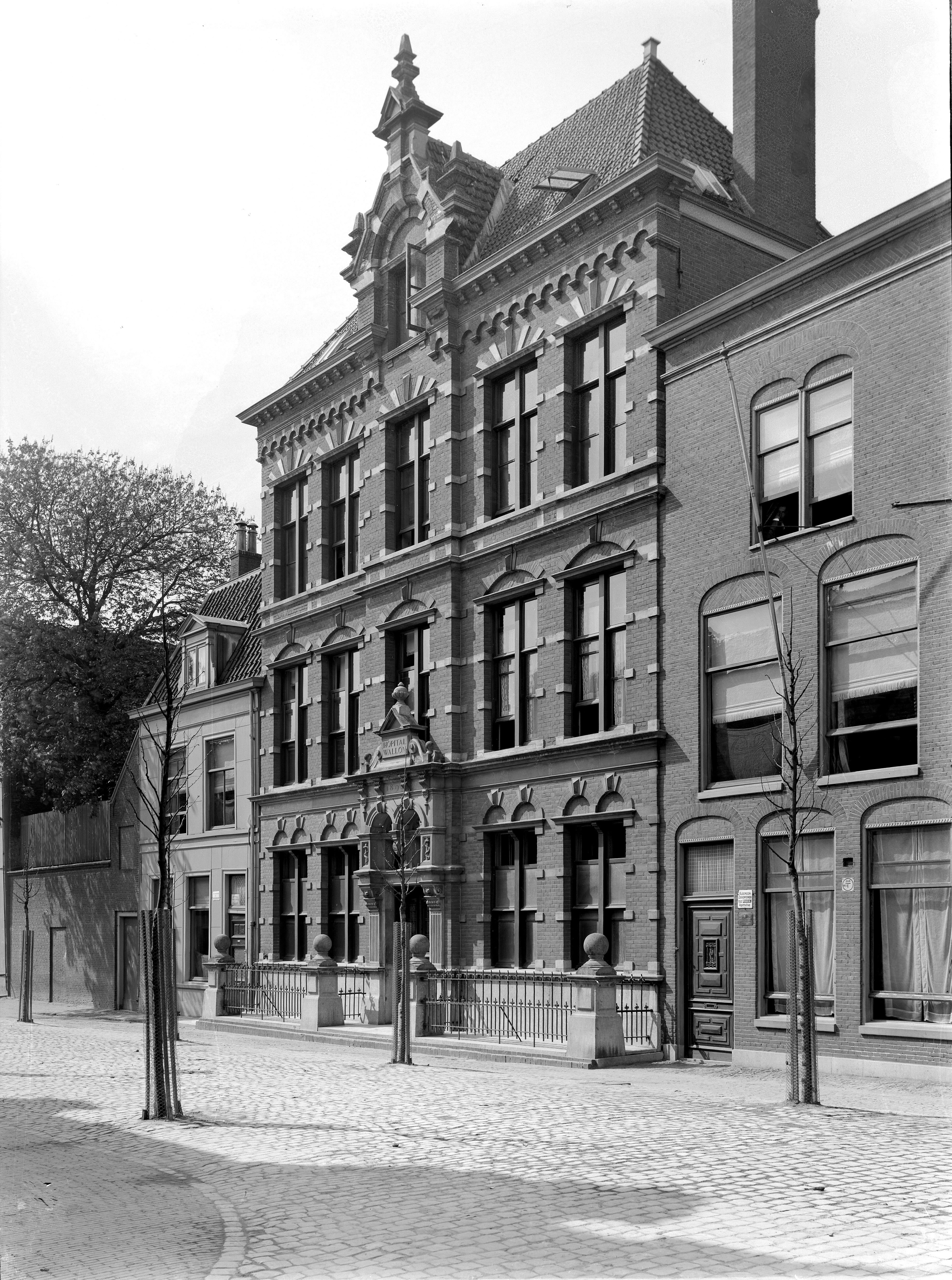 Gezicht op Hopital Wallon, het Waalse Ziekenhuis aan het Rapenburg in Leiden. Jaartal op de gevel: 1892.